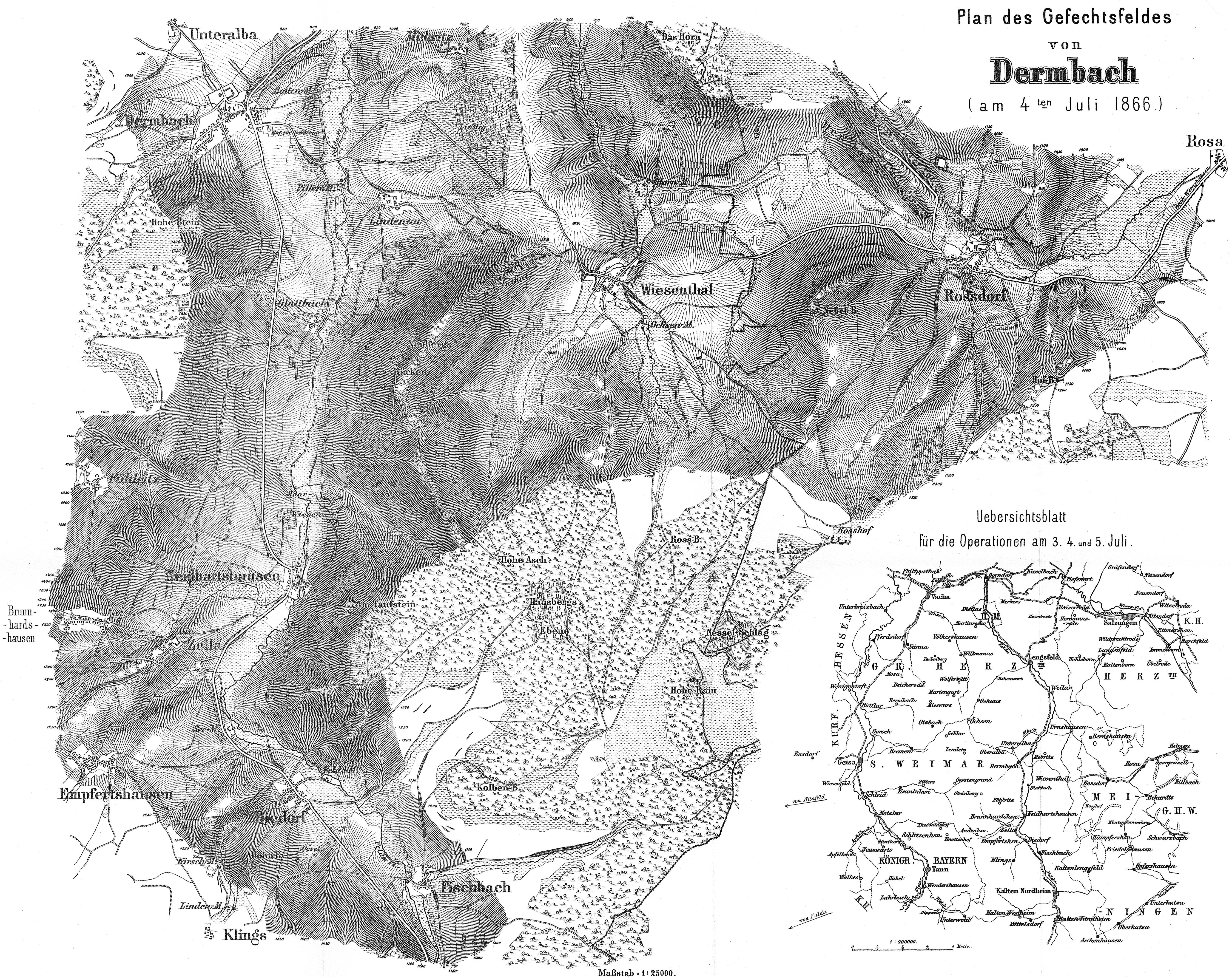 topographischer Plan des Gefechtsfeldes von Dermbach